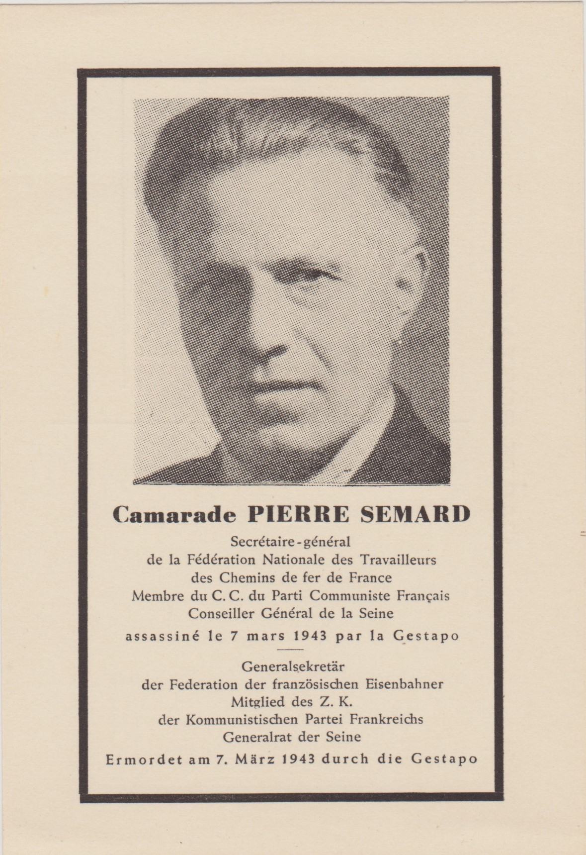 Carte postale éditée en France et en République démocratique allemande en appui à des échanges syndicaux franco - allemands (années 1950-1960).